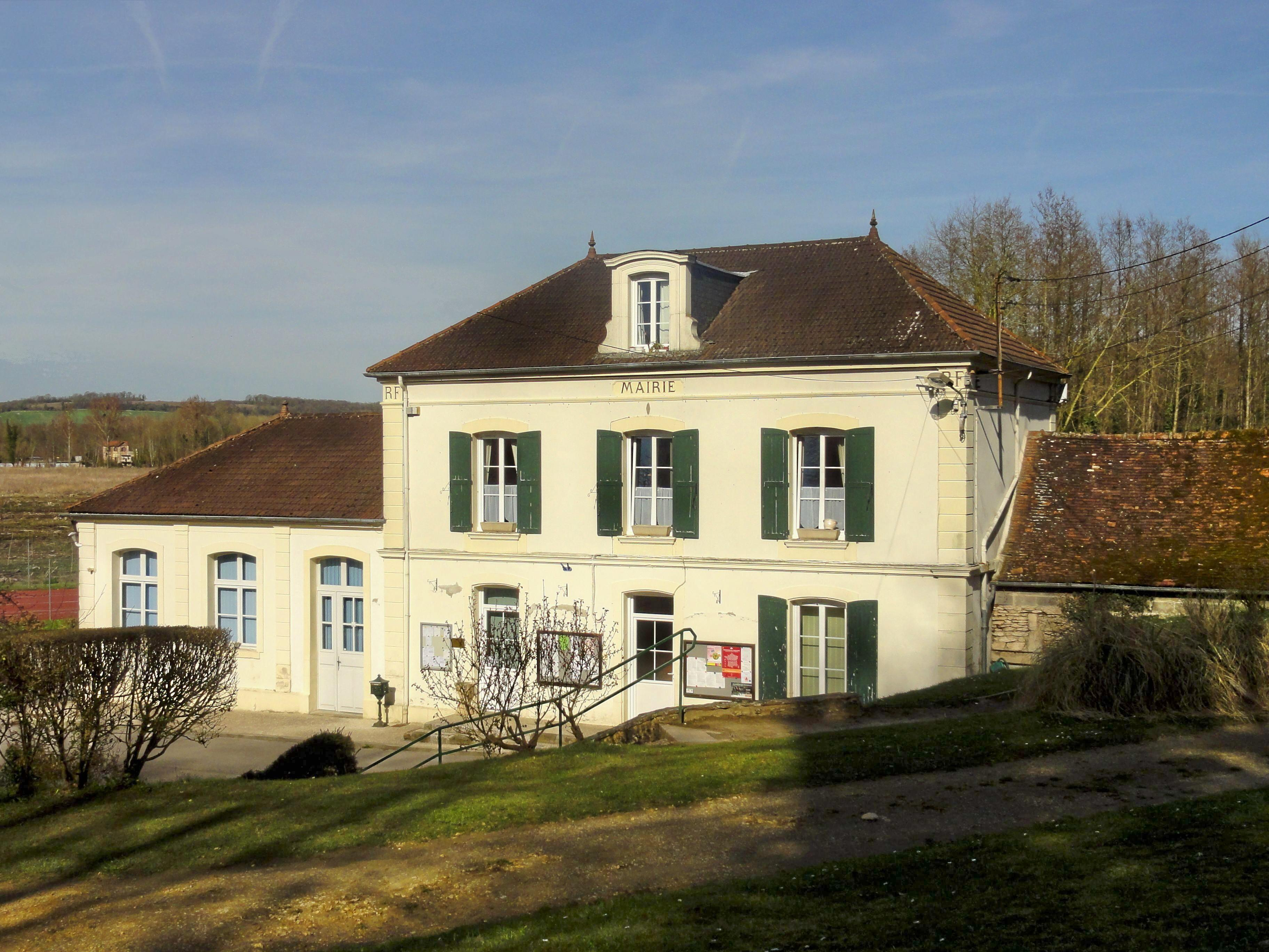 La mairie.